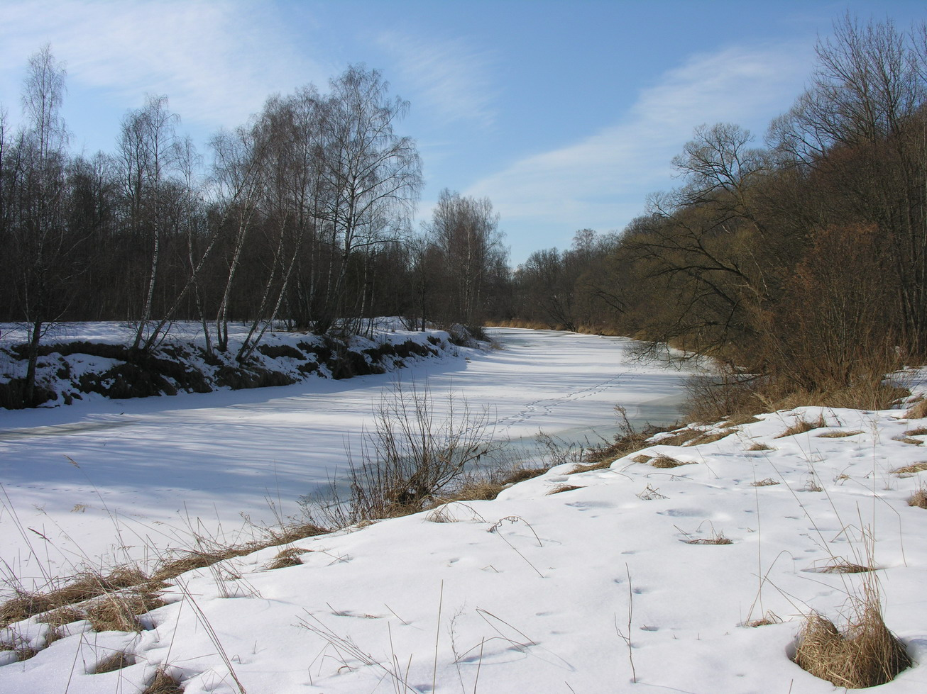 Metų laikai: žiema Foto: Algirdas, 2006 m.